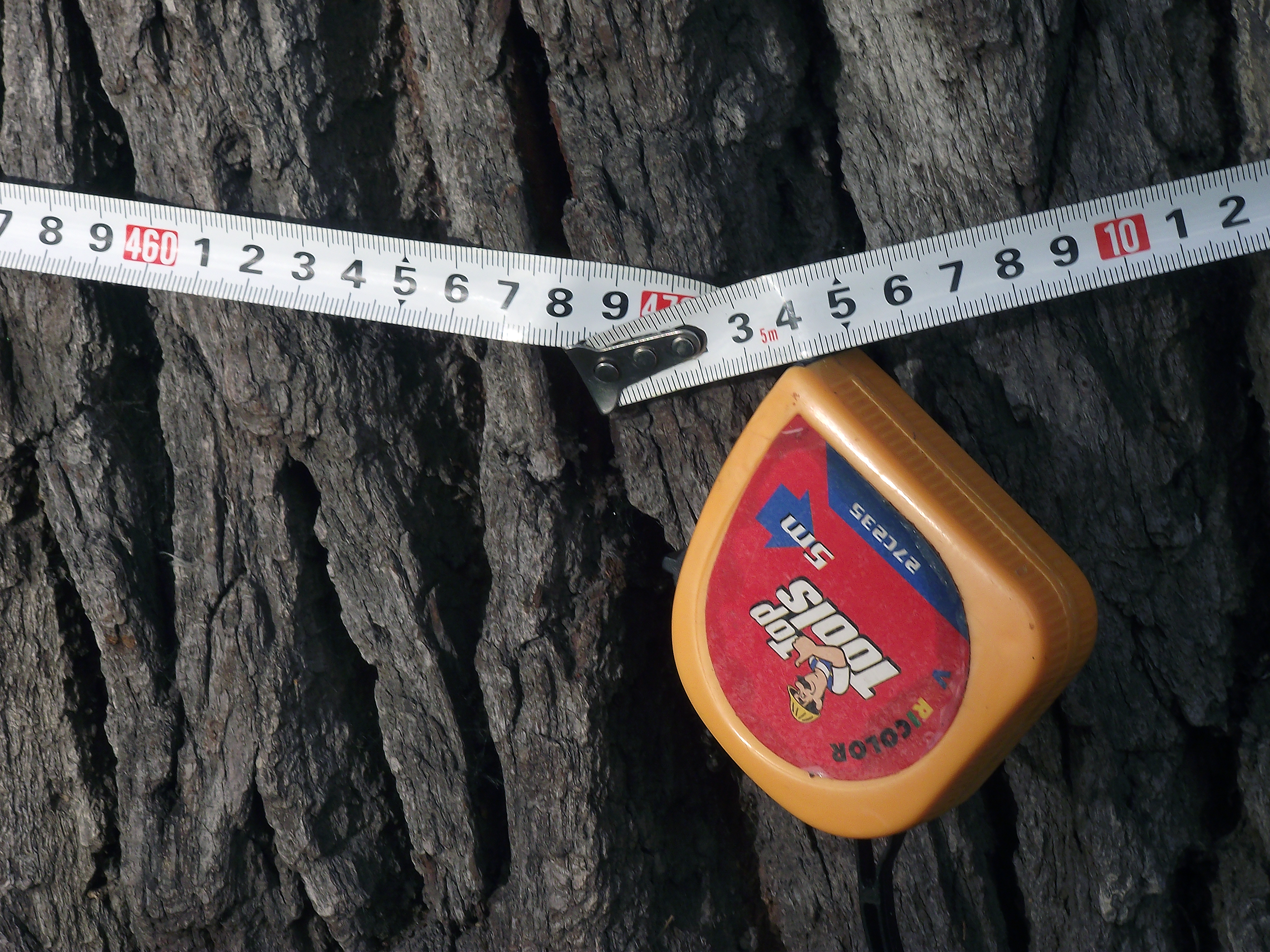 Близько 400 років. Обсяг 4,6 м. Висота 15 м.